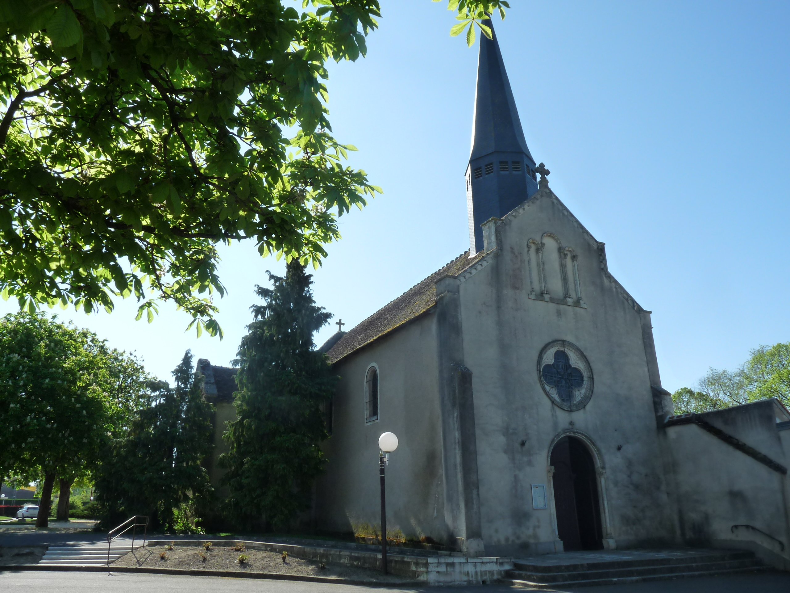 church of Saint Doulchard